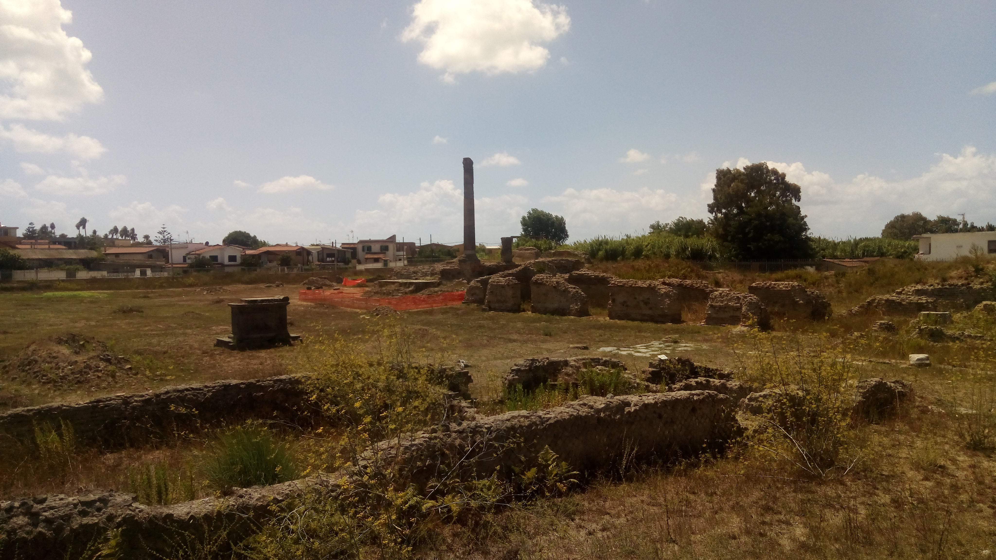 Parco archeologico dei Campi Flegrei - Parco archeologico di Liternum This is a photo of a monument which is part of cultural heritage of Italy.